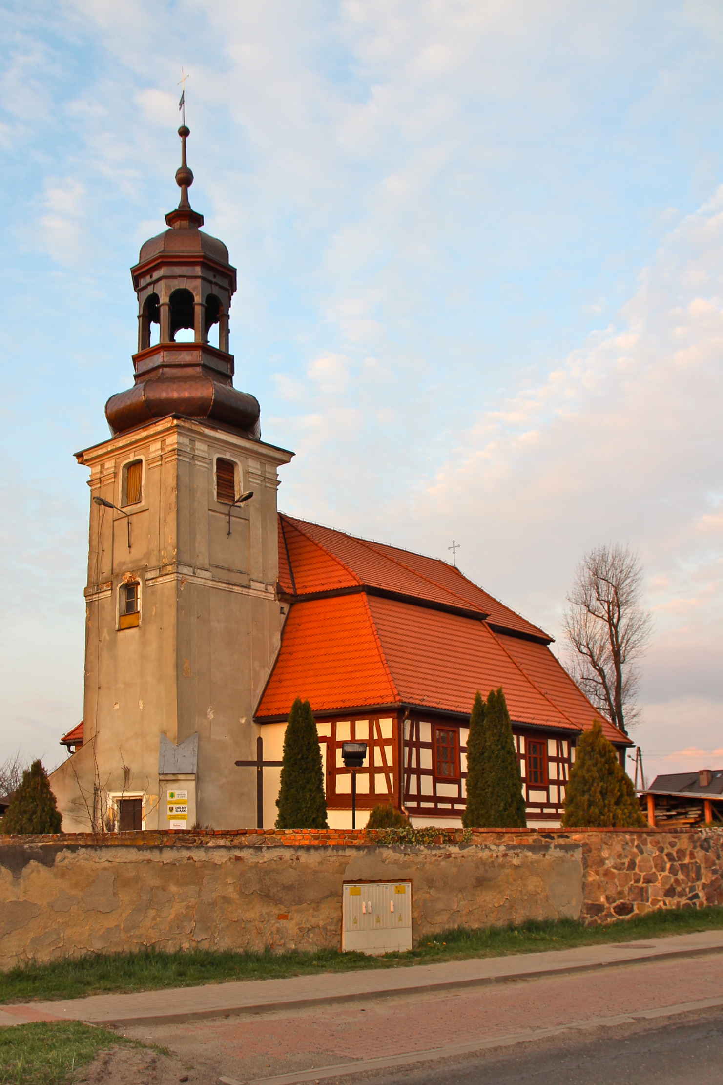 Rościsławice – wieś w Polsce w województwie dolnośląskim, w powiecie trzebnickim, w gminie Oborniki Śląskie.